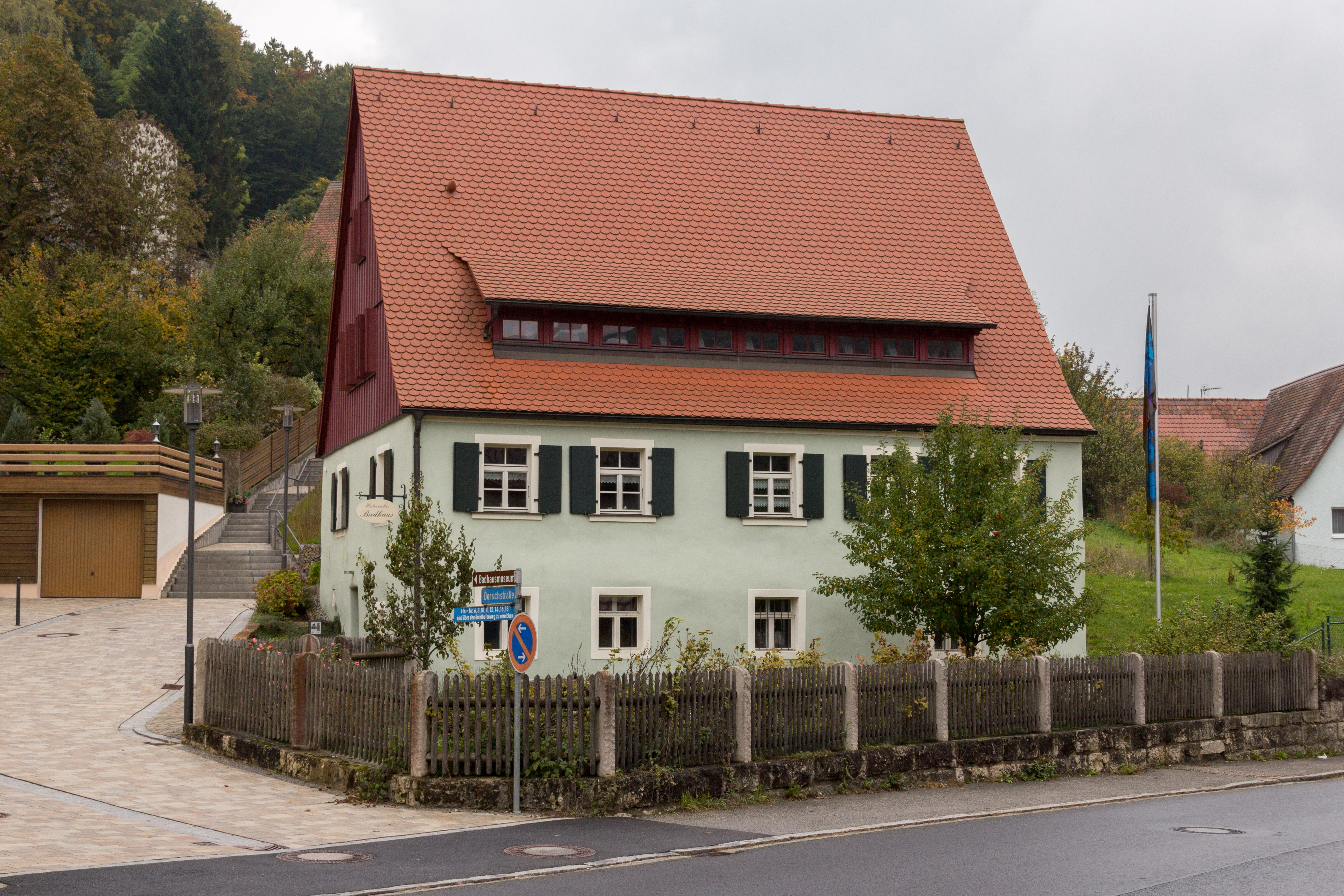 Ehemaliges Badhaus, zweigeschossiger in den Hang gebauter Satteldachbau, im 15. bis 18. Jahrhundert errichtet und umgebaut, seit 1486 überliefert, zuletzt prägend verändert drittes Viertel 19. Jahrhundert, Pommelsbrunn, Museum